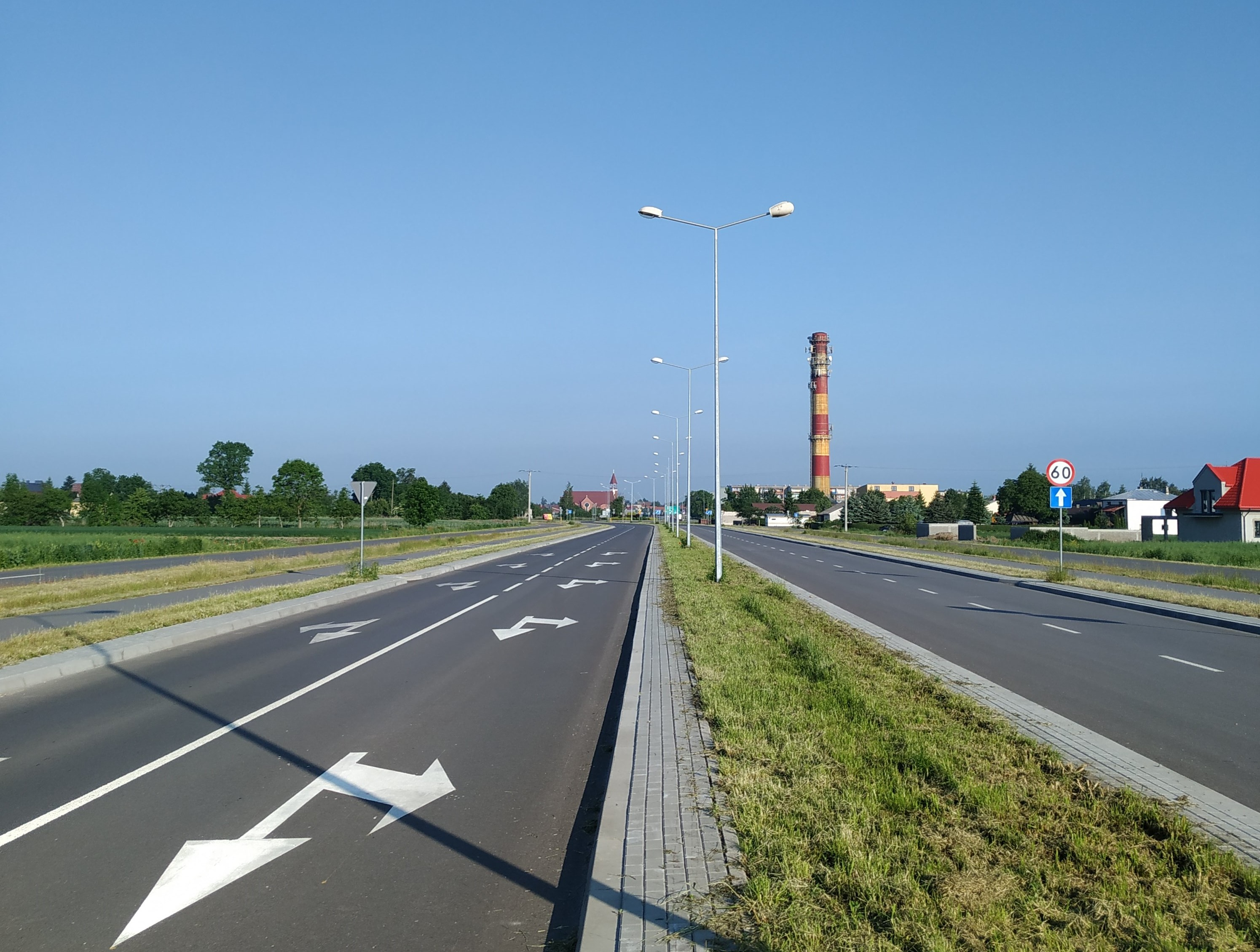 Tzw. mała obwodnica Łukowa